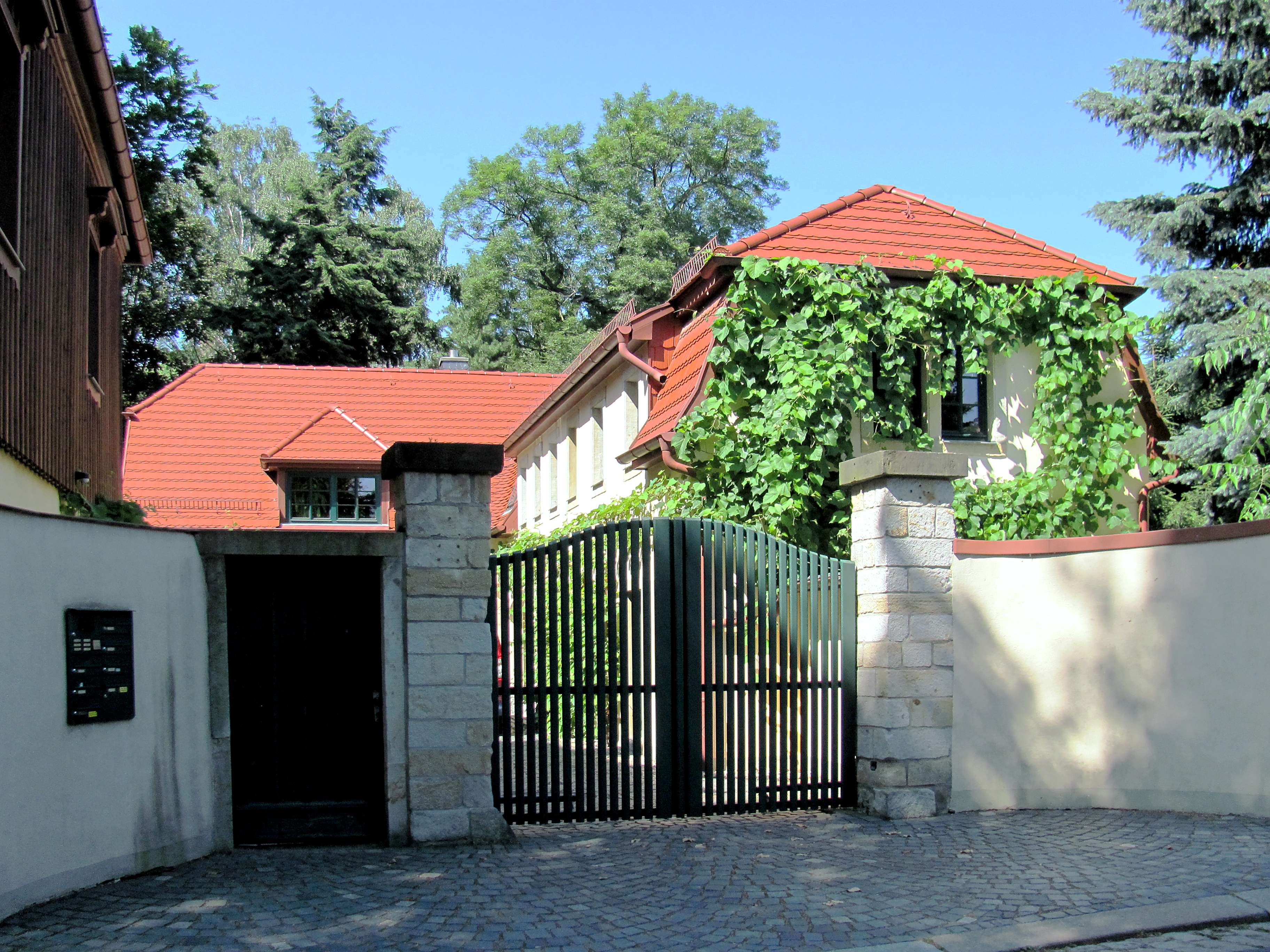 Radebeul-Oberlößnitz, Haus Friedland: Seiten- und Hintergebäude